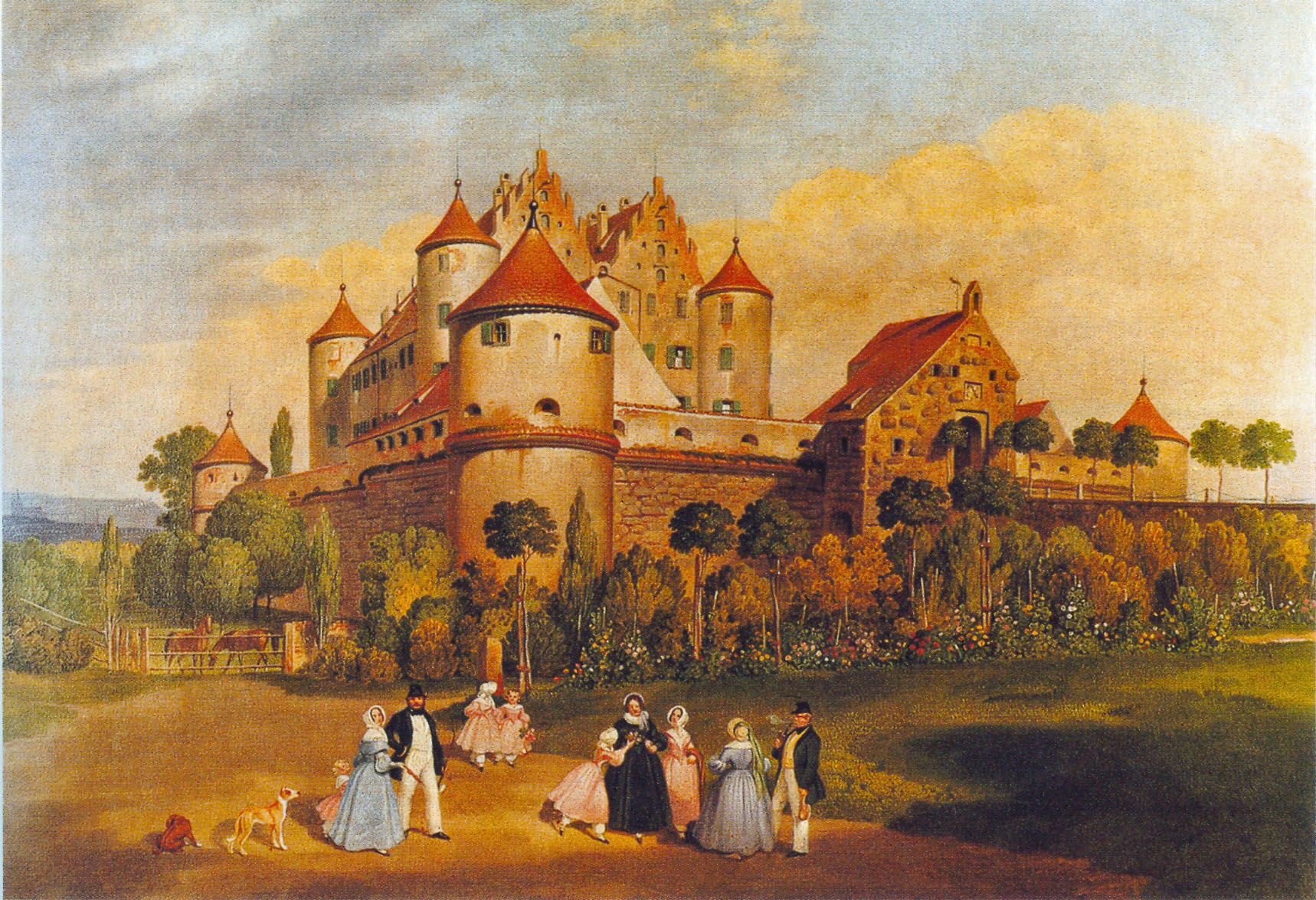 Schloss Erbach der Freiherren von Ulm-Erbach Ölgemälde